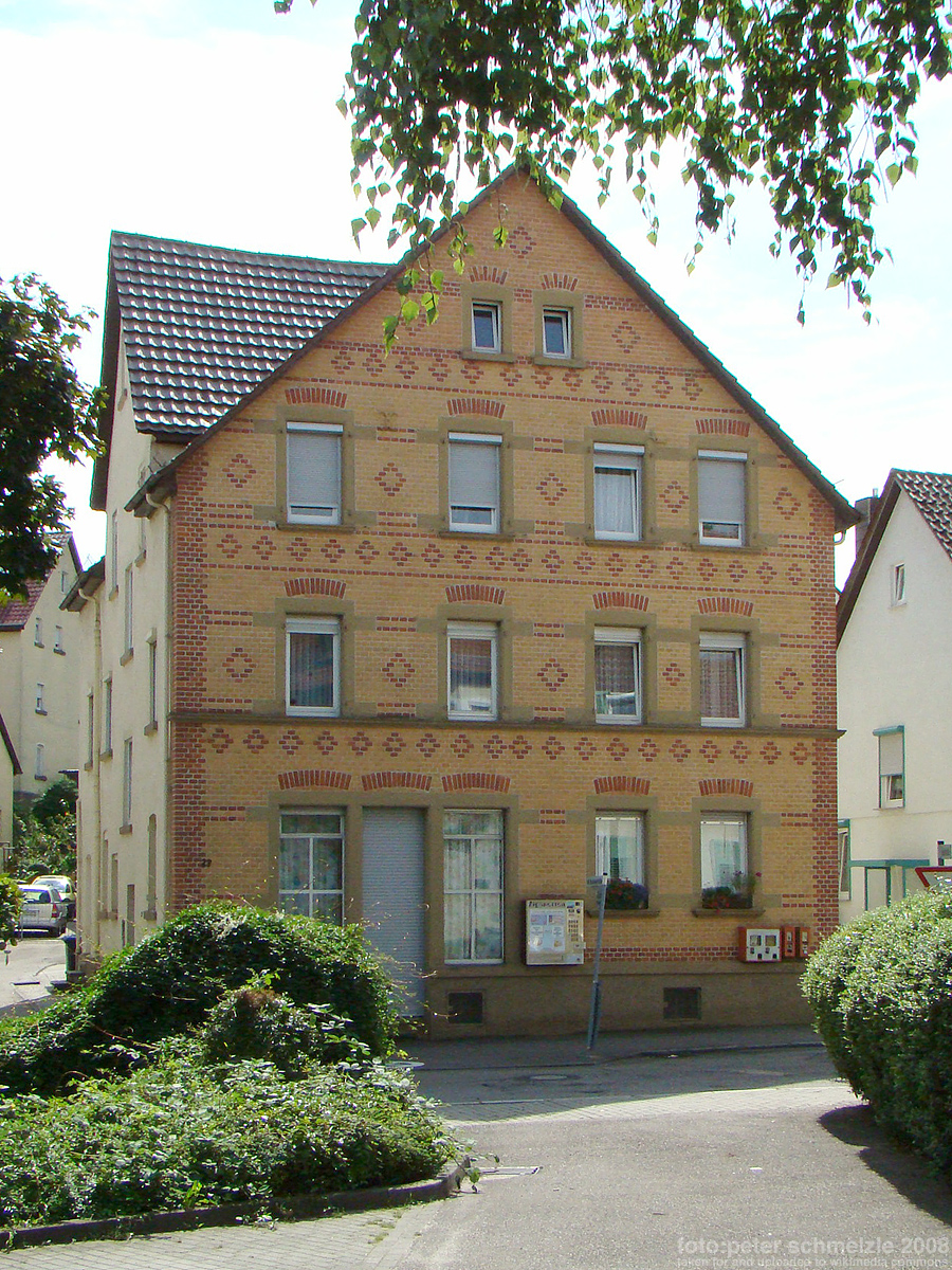 Denkmalgeschütztes Gebäude Heckenstr. 27 in Heilbronn-Böckingen